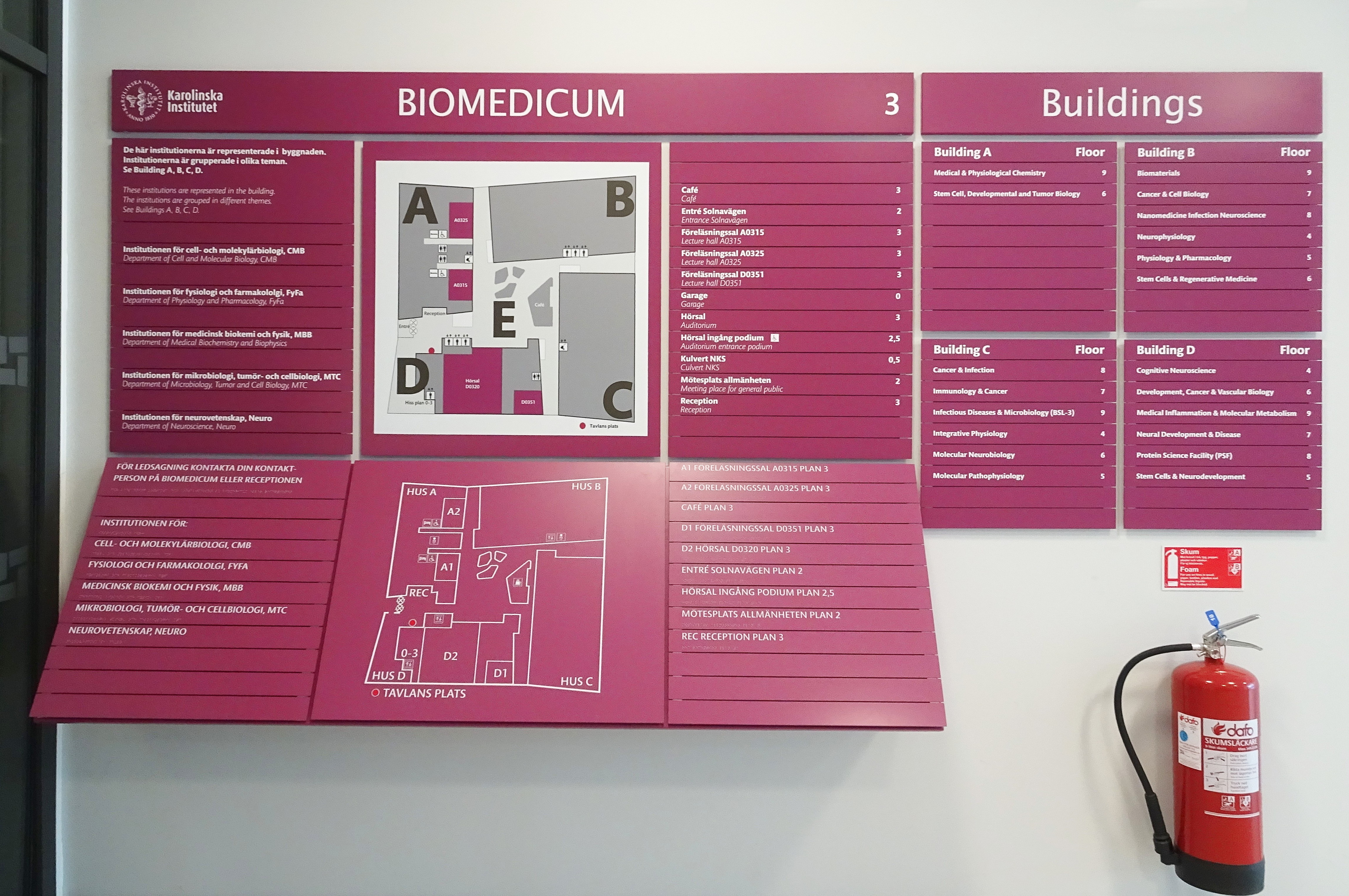 Biomedicum, Solna, interiör